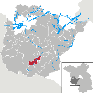 Planetal in Brandenburg (Country) - District Potsdam-Mittelmark